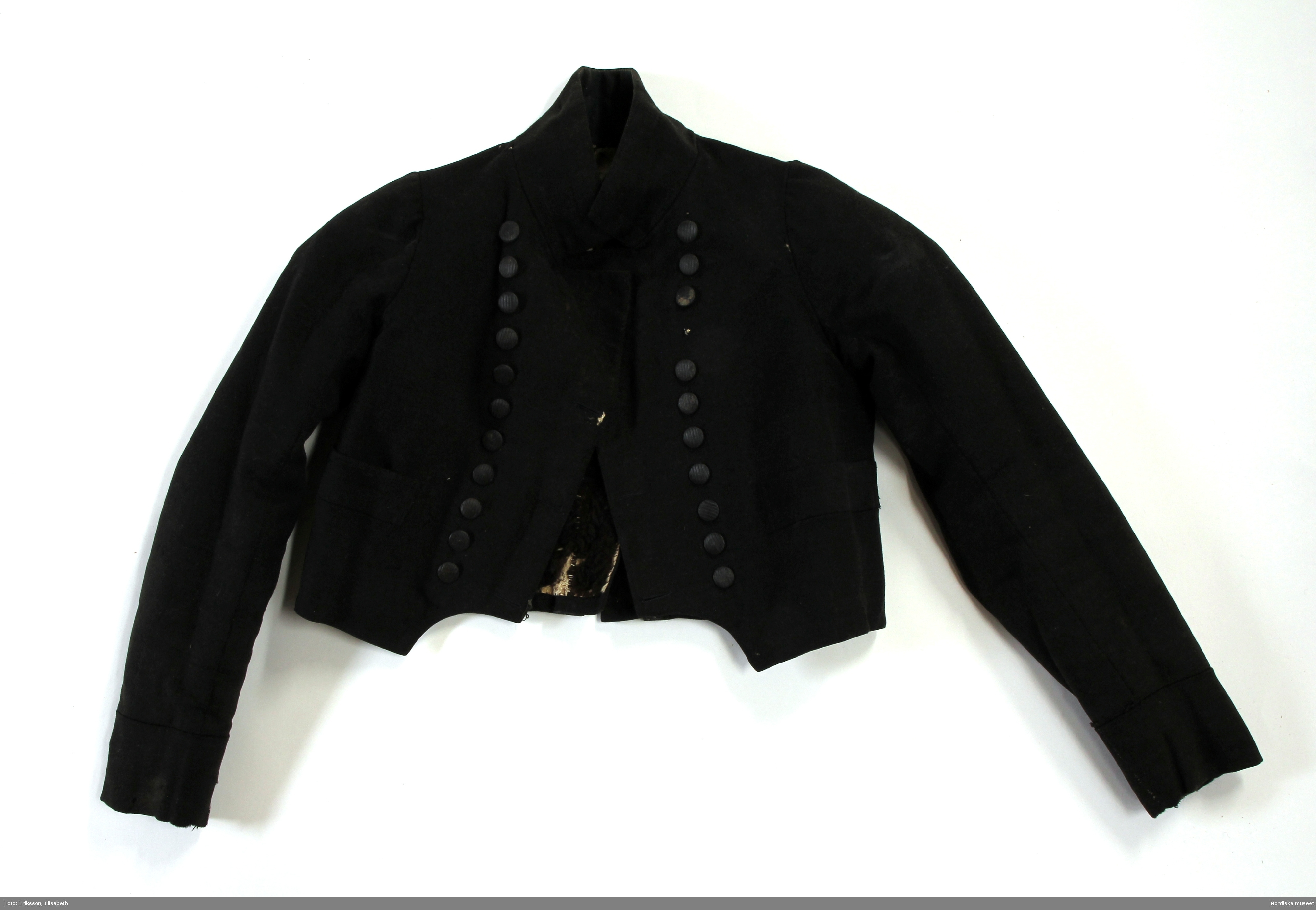 Jacka